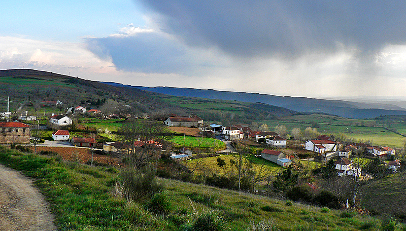 Tuizelo, vista a partir de colina